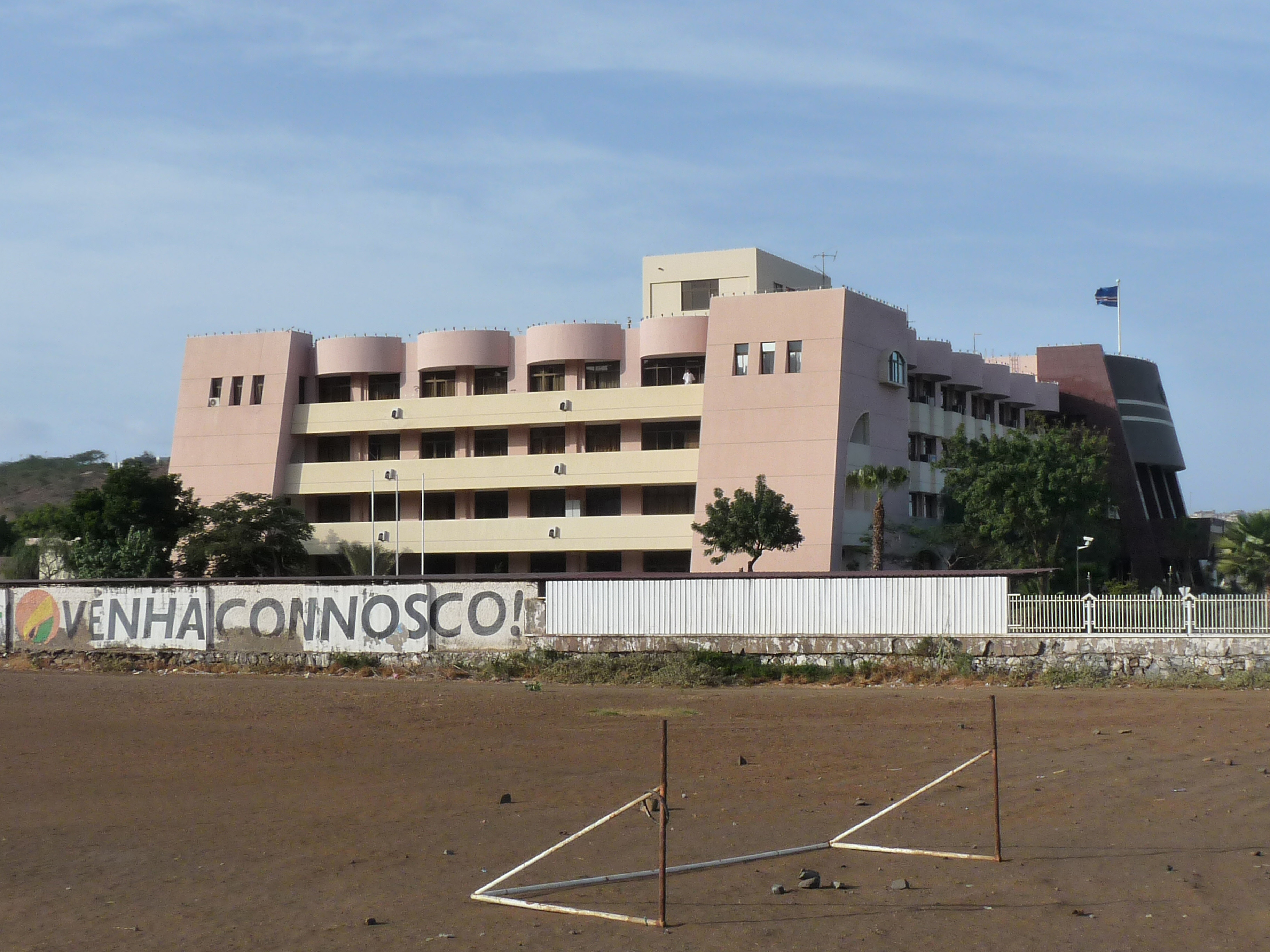 Praia : Assemblée nationale du Cap-Vert